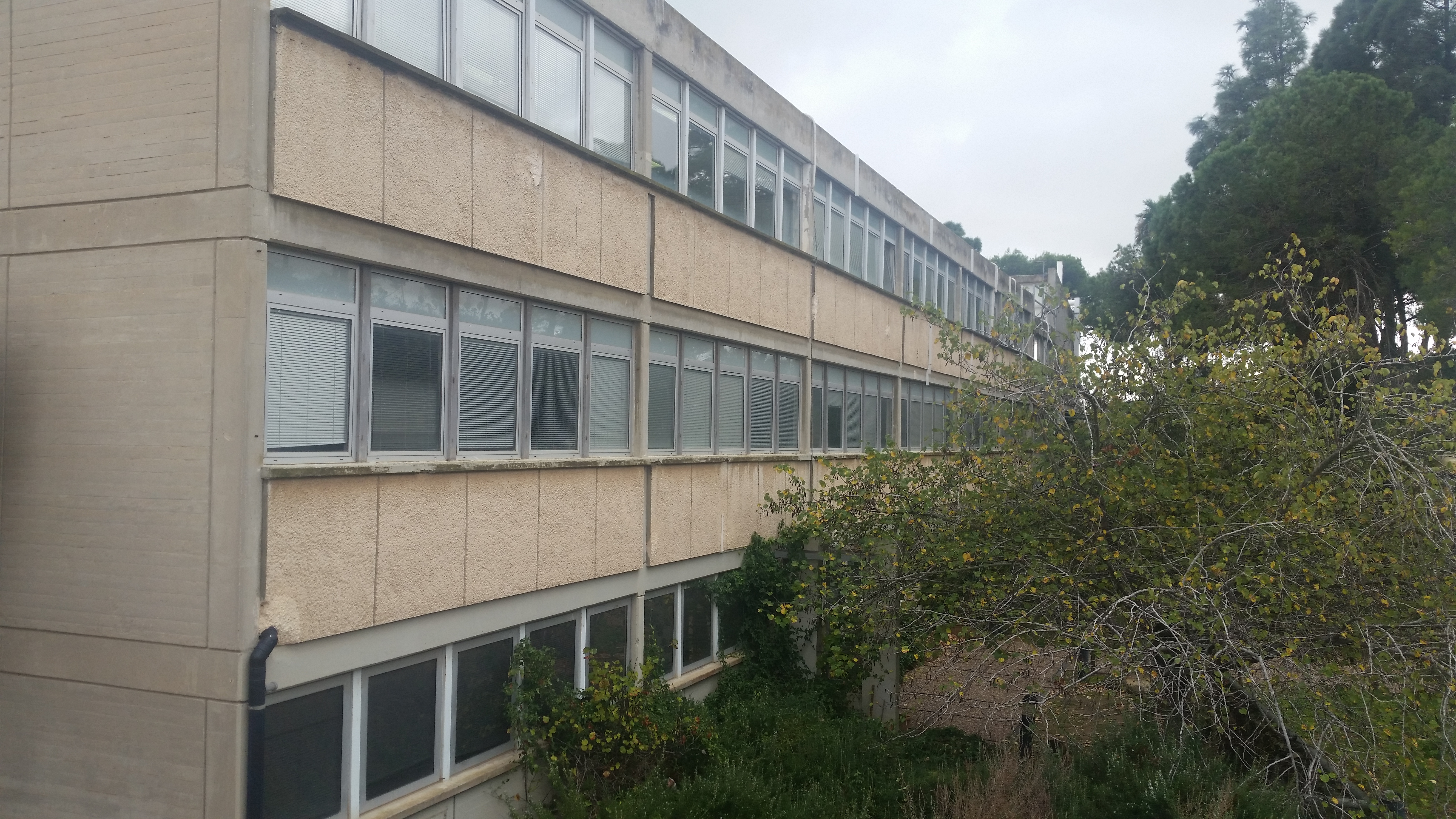 (מבנה המכון ללימודי ים ע"ש ליאון רקנאטי (בעבר- המרכז ללימודי ים באוניברסיטת חיפה. המכון הוא מכון מחקר בין תחומי ורב תחומי, הכולל חוקרים אשר עיקר התעניינותם המקצועית הקשר בין האדם וסביבתו הימית בעבר, בהווה ולקראת העתיד.